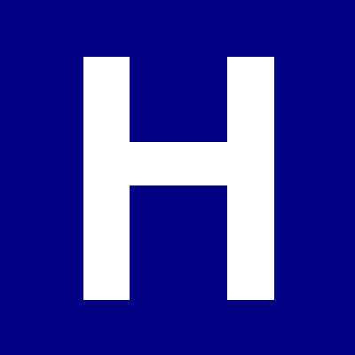 Hospital sign